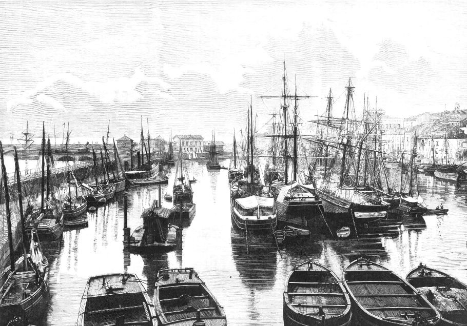 Puerto de Gijón (Oviedo). De fotografía recientemente hecha con motivo de la inauguración del Camino de Hierro del Noroeste